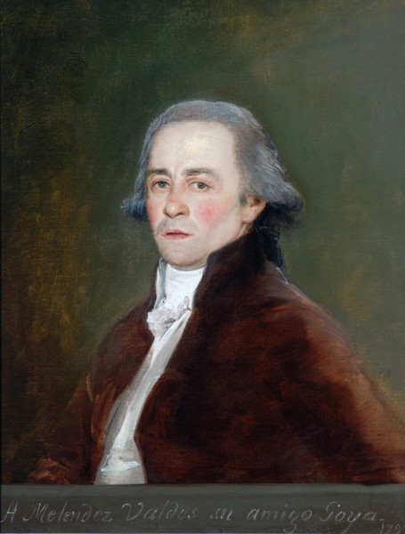 Portrait of Juan Meléndez Valdés (1754-1817), Spanish writer